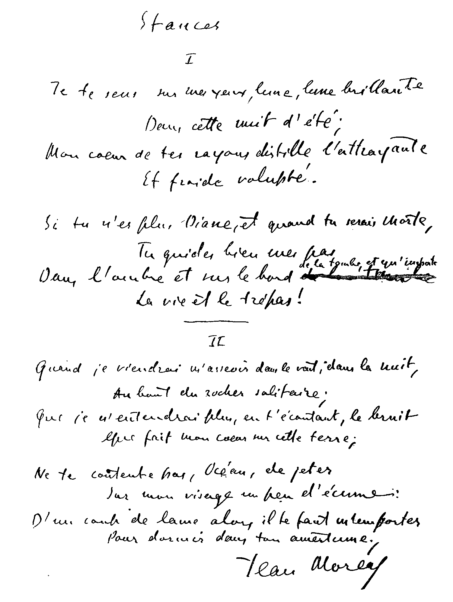 Autographe de Jean Moréas (1856-1910) : Stances du livre IV (XIII) et livre V (XII) publiées en 1899.